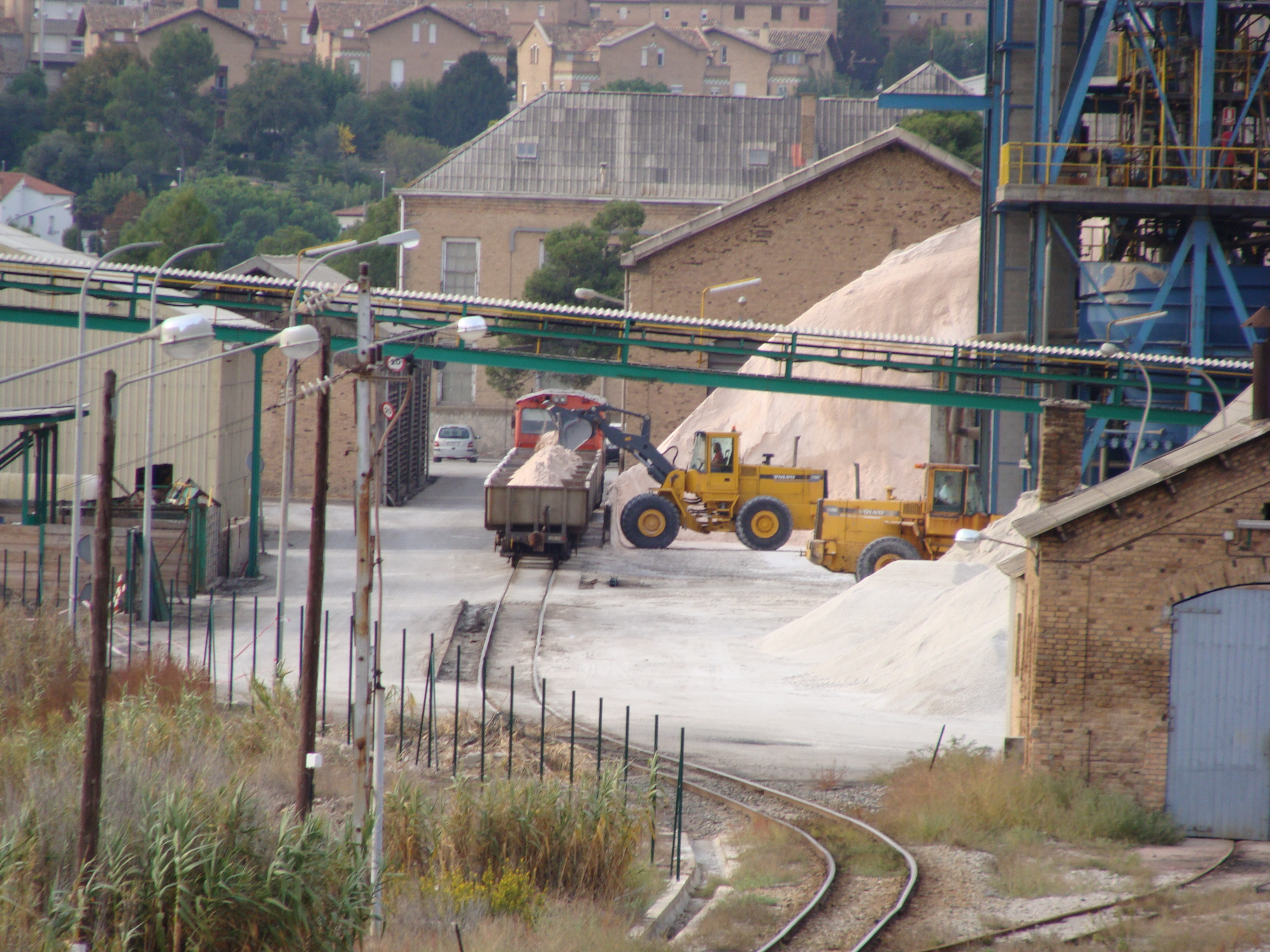 [CAT]: A l'interior del recinte de la mina, la 254.03 va al cap davant dels 8 vagons 63000, que una excavadora els va omplint de sal. [ES]: En el interior del recinto de la mina, la 254.03 va al frente de los 8 vagones 63000, que una excavadora los va llenando de sal.